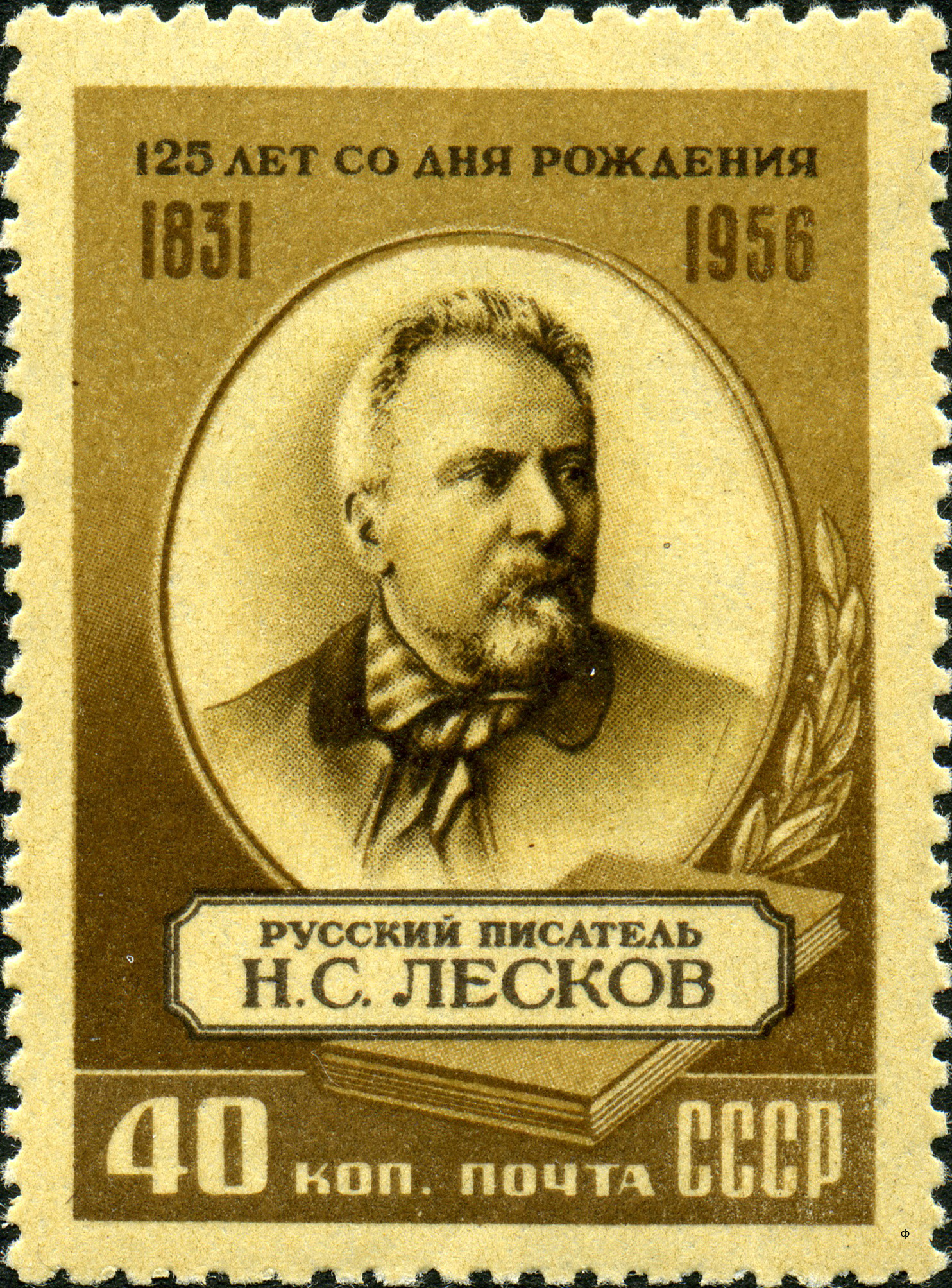 Марка СССР